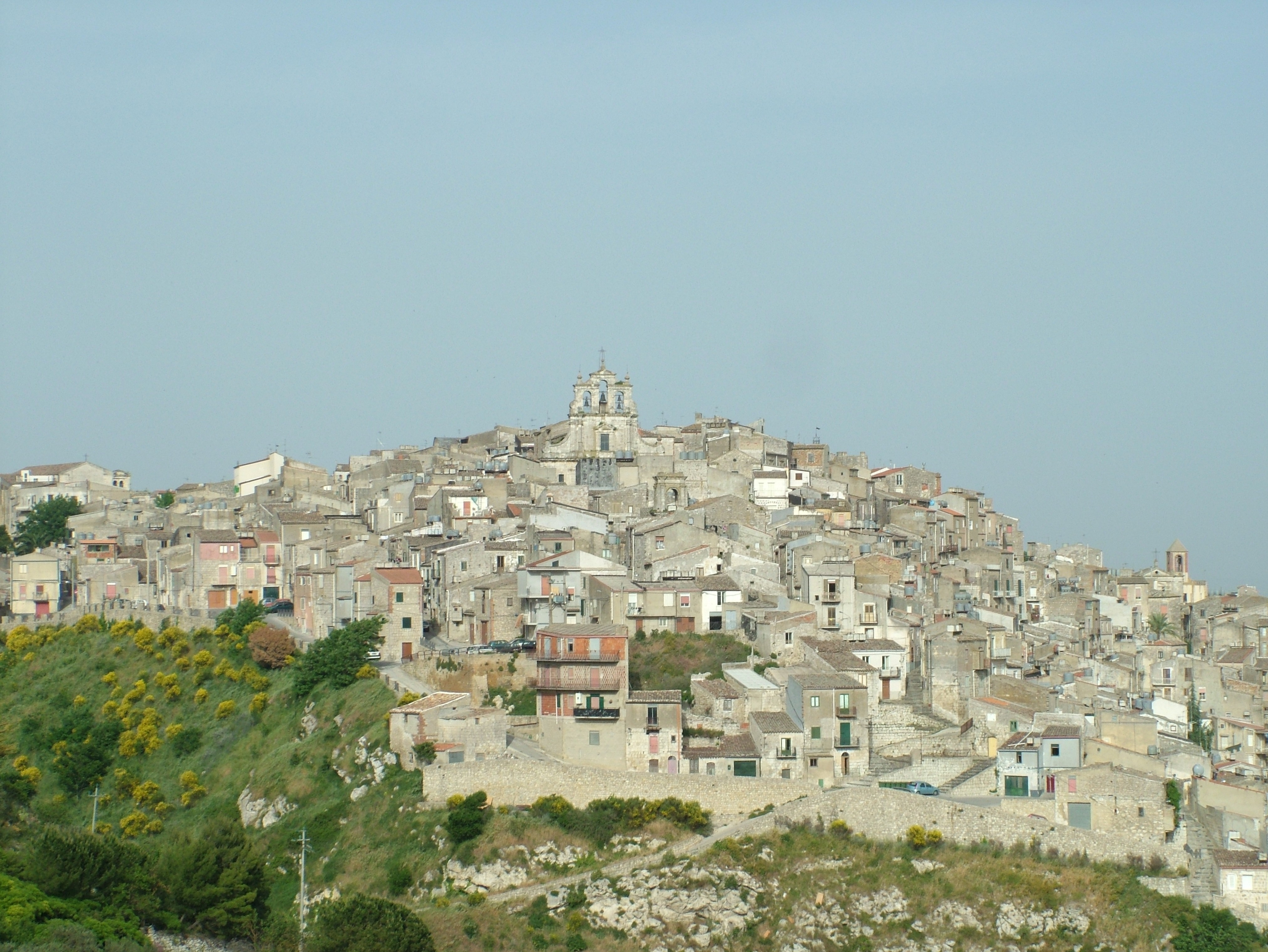 Mussomeli, Sizilien, sicht von der Straße aus